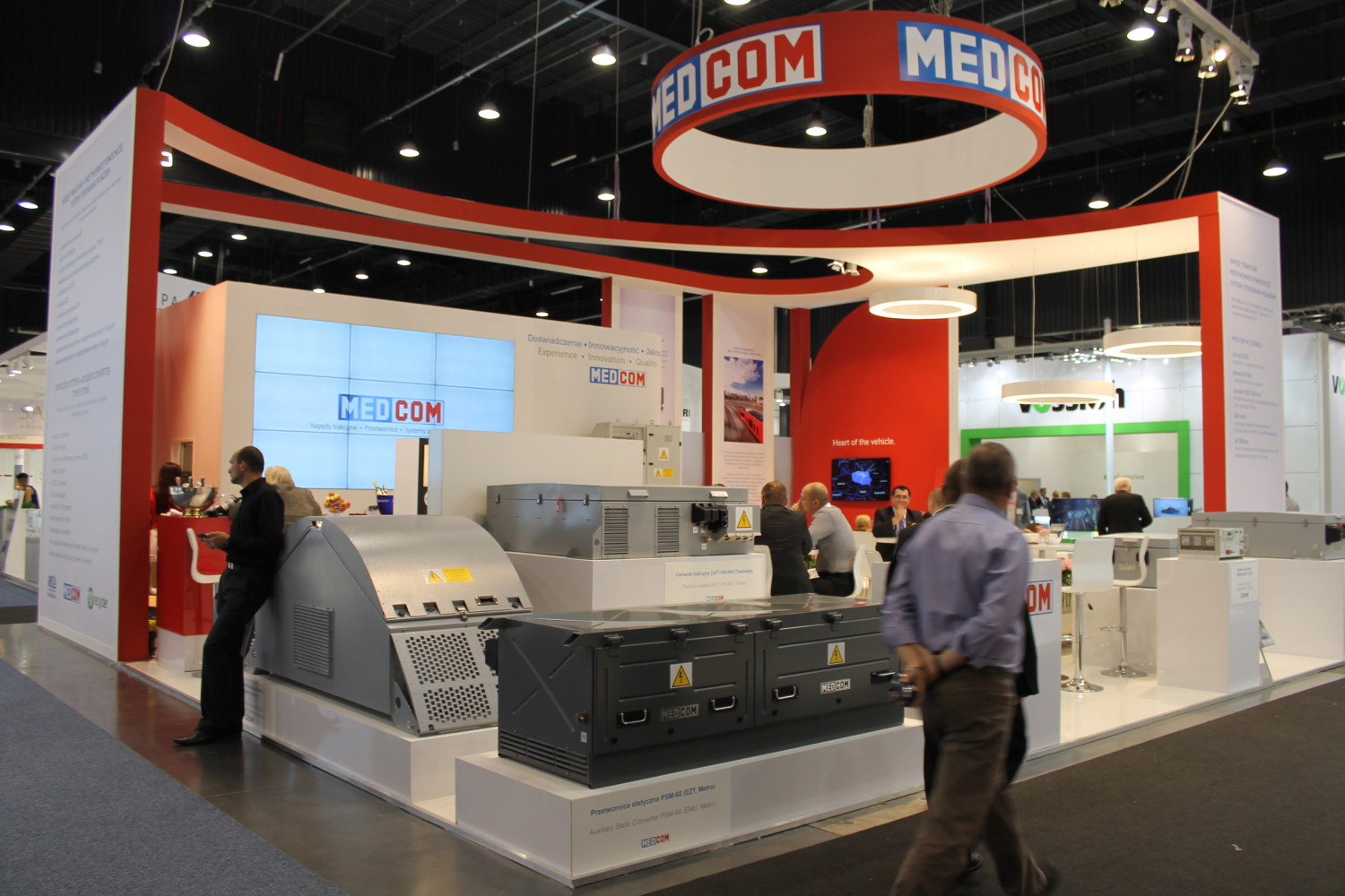 Stoisko Medcomu podczas targów Trako 2015. The making of this document was supported by Wikimedia Polska Association, within Wikigrant no. WG 2015-34. English | polski | +/−